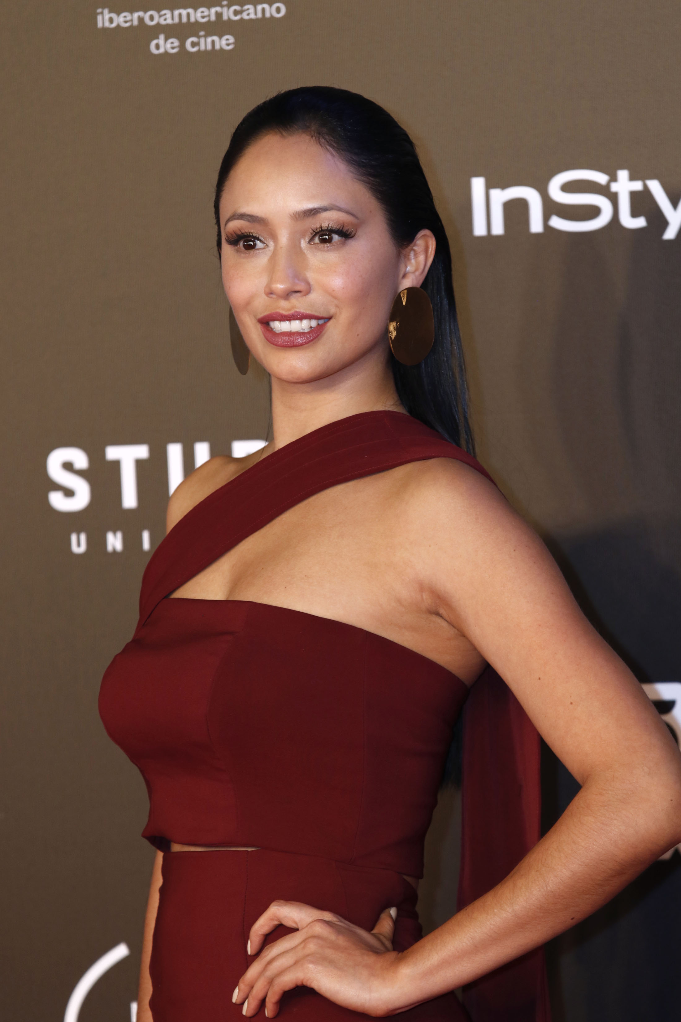 En el Teatro de la Ciudad Esperanza Iris, se realizó la 4ª Entrega del Premio Iberoamericano de Cine, Fenix, previo a la ceremonia, nominados, conductores, presentadores y elencos, desfilaron por la alfombra roja.